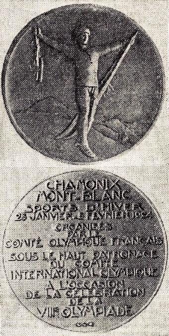 La médaille des Jeux Olympiques d'Hiver de Chamonix en 1924.